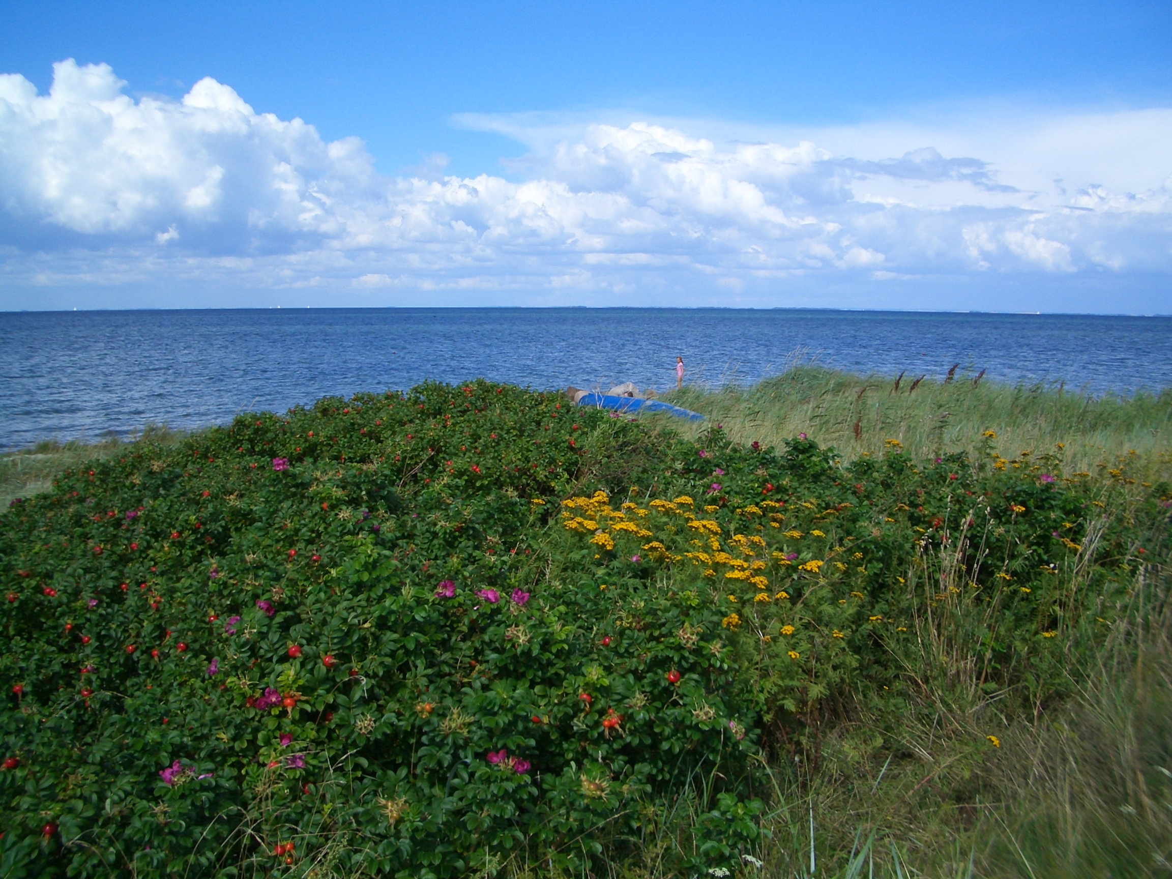 The seaside in summer - Femø